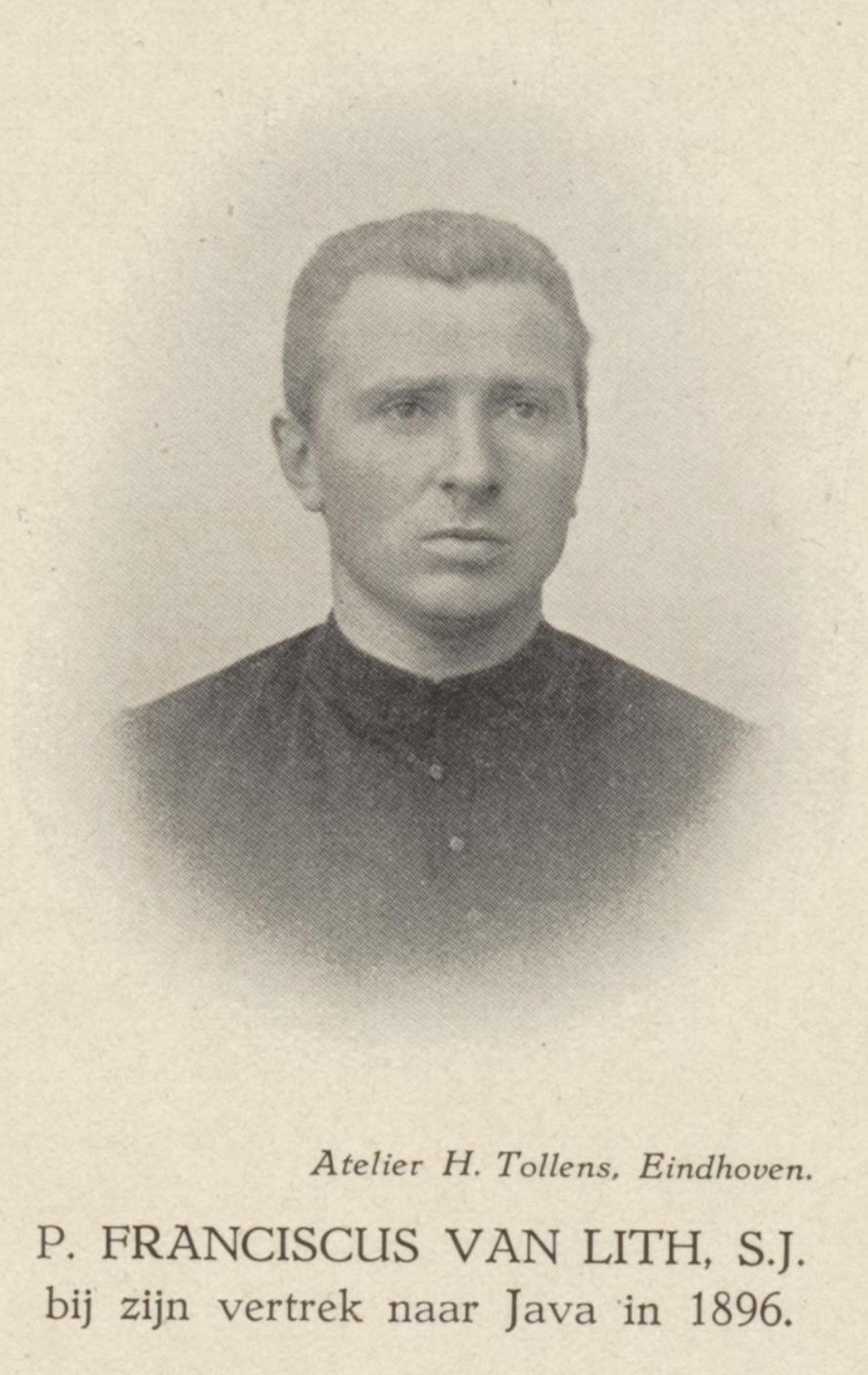 P. FRANCISCUS VAN LITH, S.J. pada keberangkatannya ke Jawa pada tahun 1896.